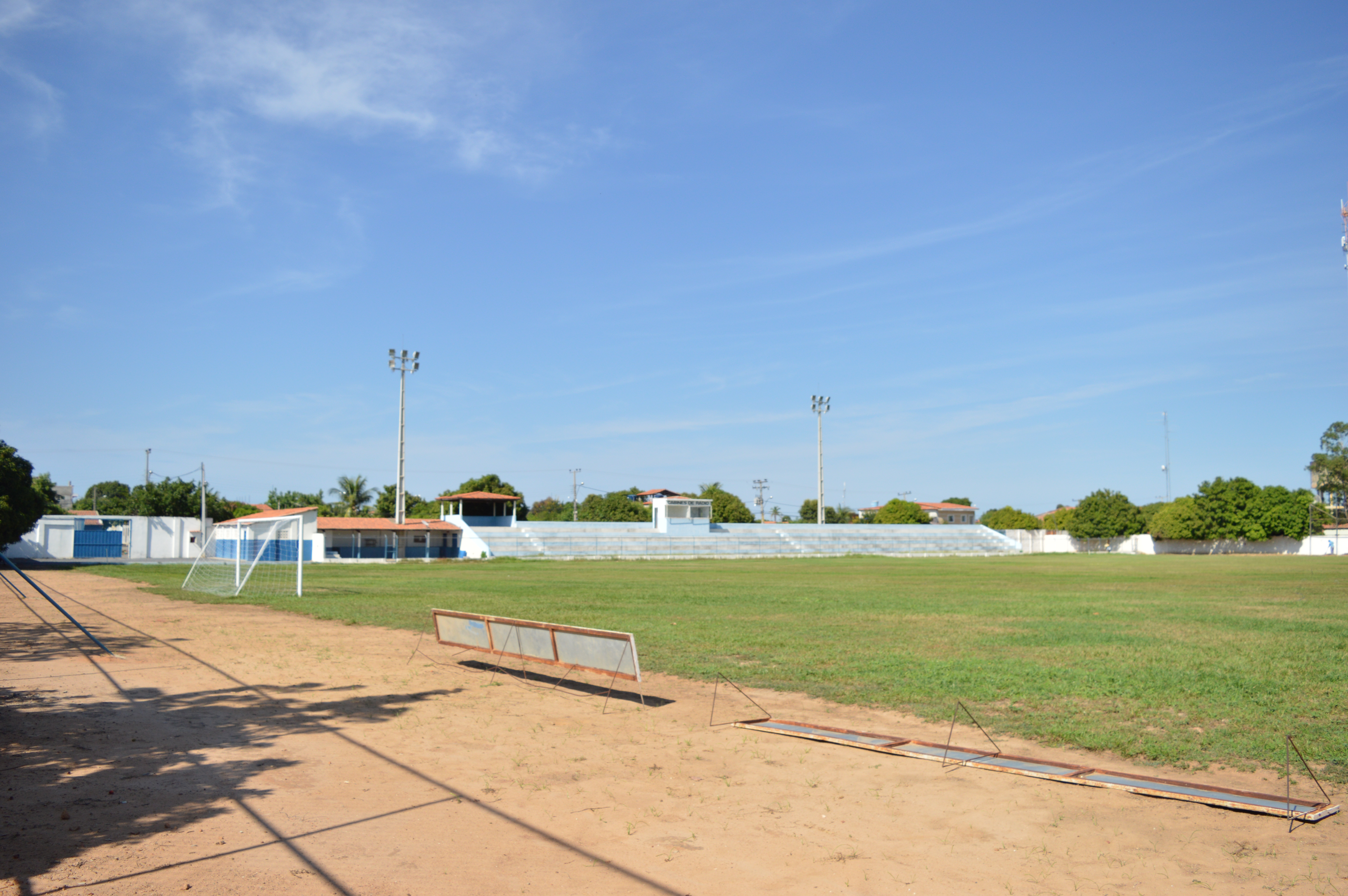 Vista interna do Estádio Waldemiro Cruz em Paratinga. Foto de 16 de janeiro de 2017.